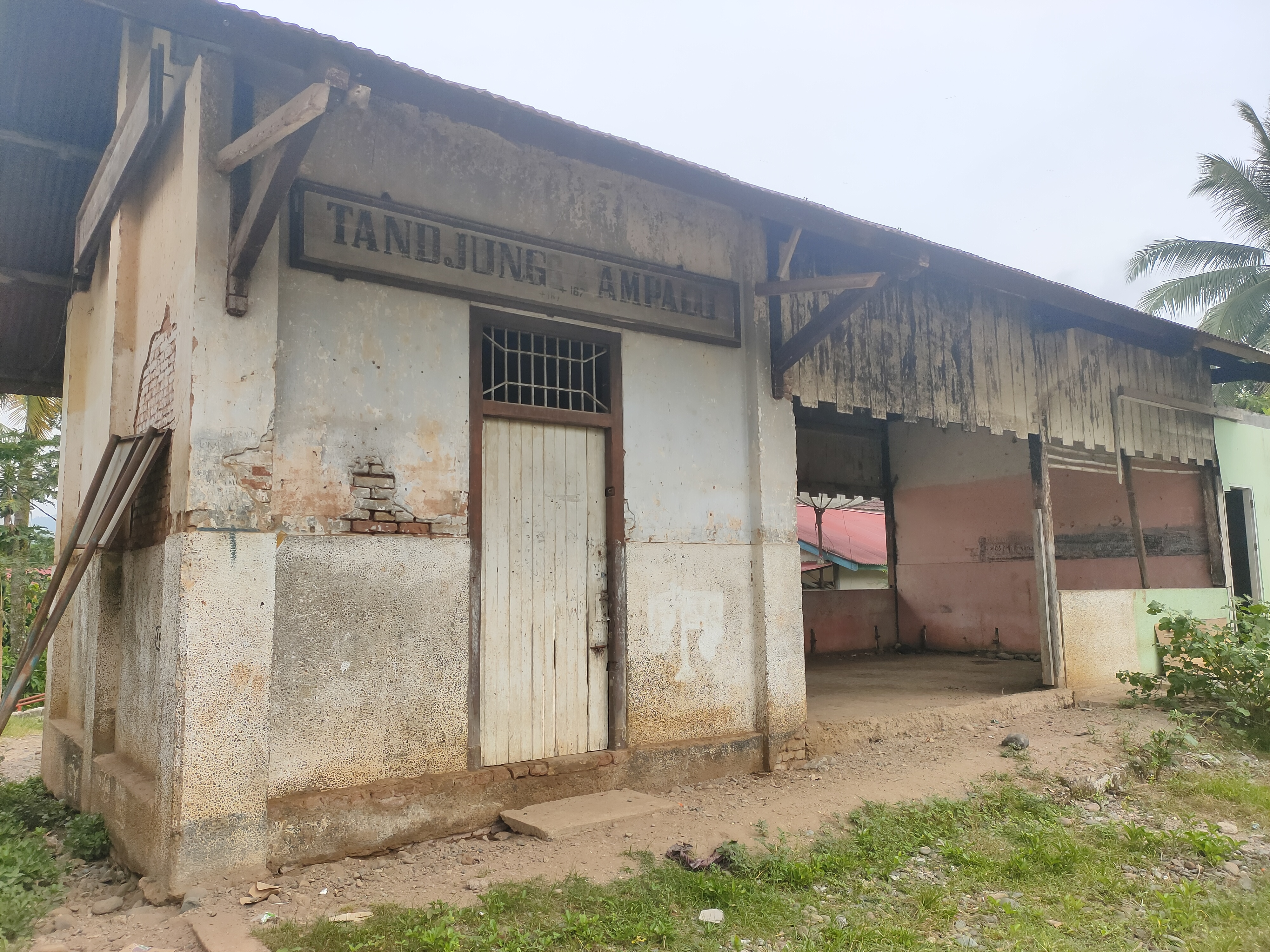 Stasiun Tanjung Ampalu pada tahun 2020 di Jorong Batu Gondang, Kecamatan Koto VII, Kabupaten Sijunjung, Sumatera Barat